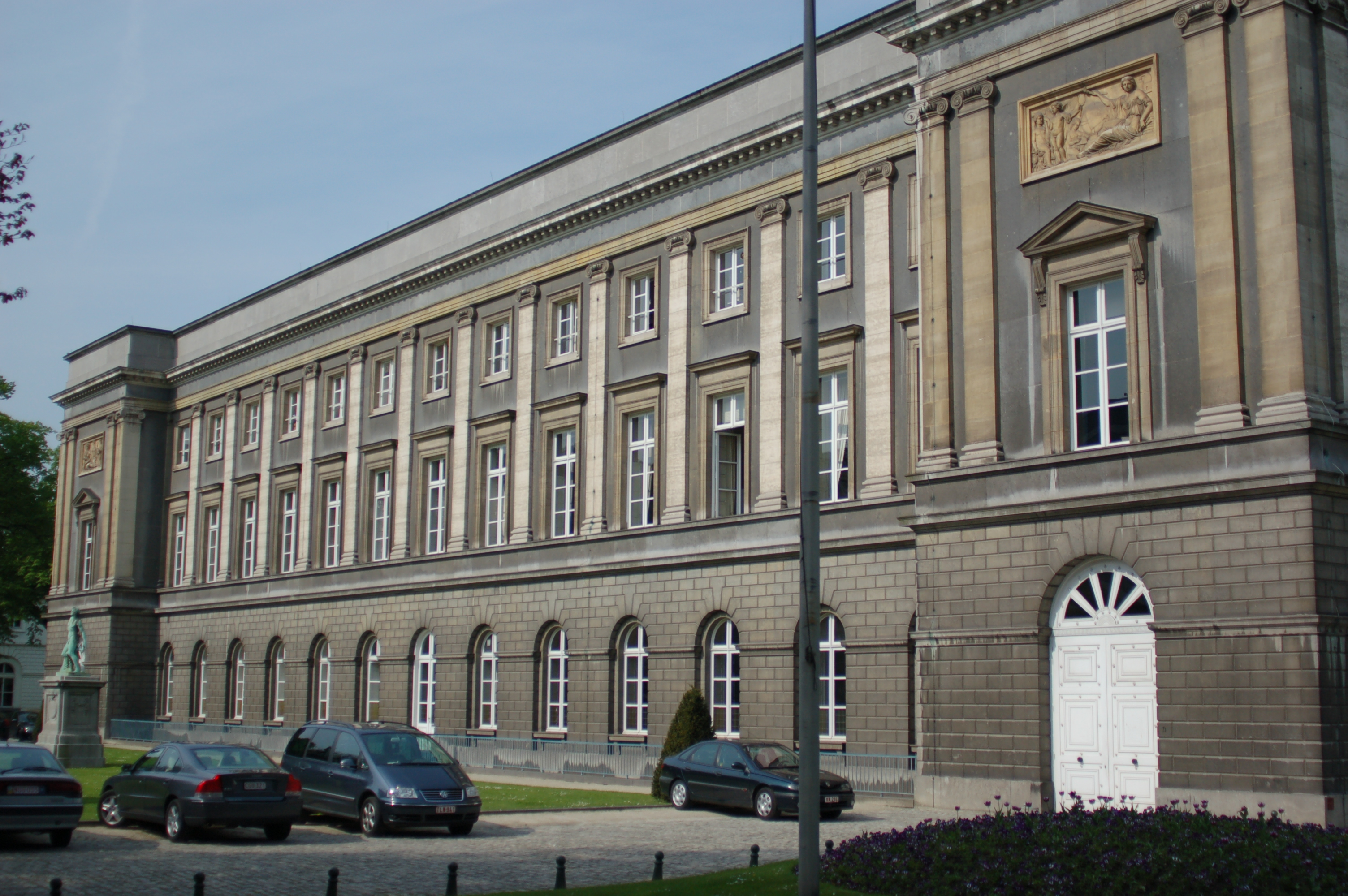 Brussel, België: Koninklijke Vlaamse Academie van België voor Wetenschappen en Kunsten